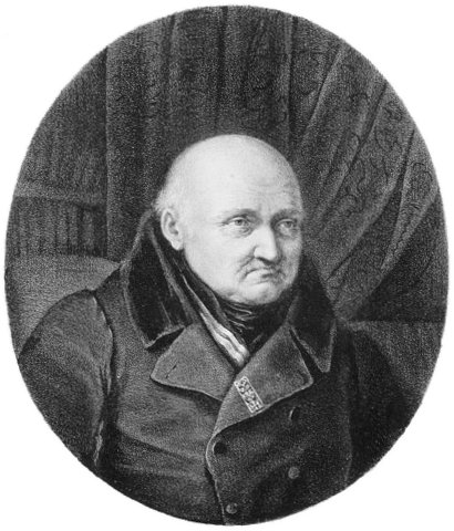 Józef Kalasanty Szaniawski